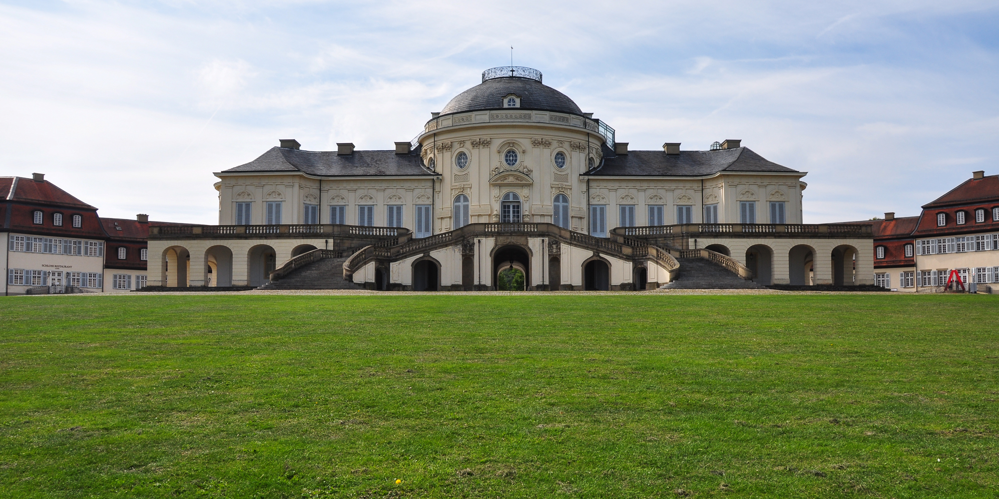 Schloß Solitude und Schloß Monrepos sind über eine gerade Luftlinie von 15km Länge miteinander verbunden.